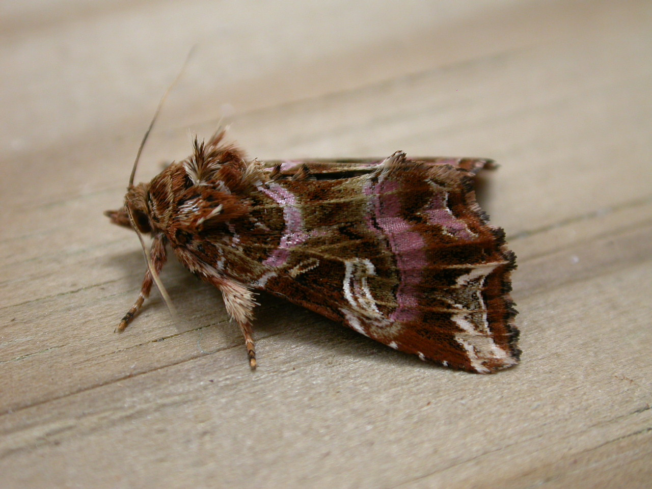 Callopistria juventina, Gastes, Landes, SW France, 1/2 July 2003